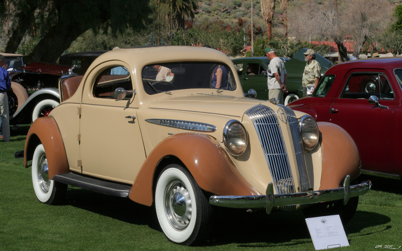 1936 Hupmobile 618 G 2-door rumble seat coupe - tan - fvr